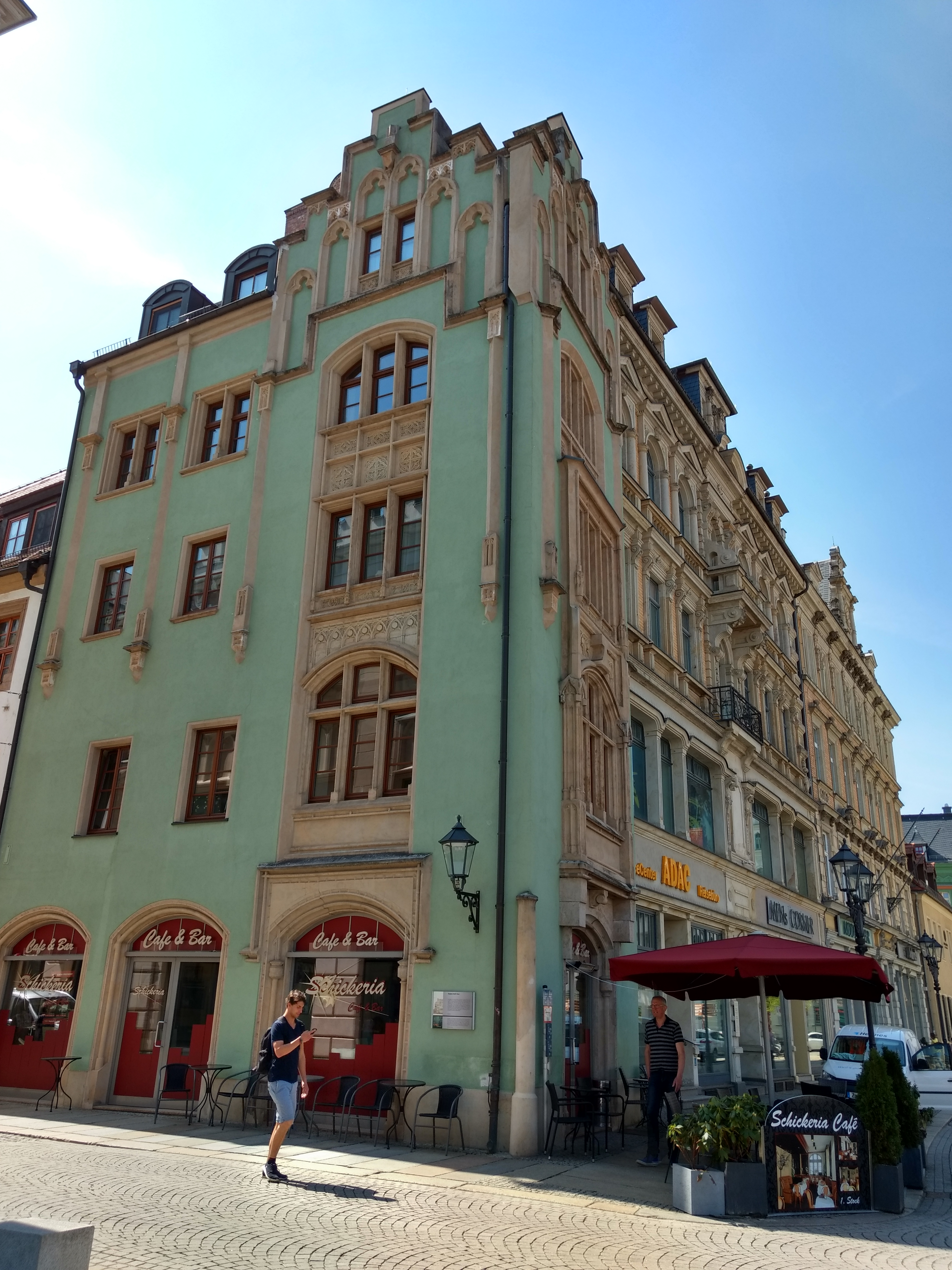 Ehemaliges Wohnhaus von Stephan Roth in Zwickau (Hauptmarkt 2). Tafel am Haus